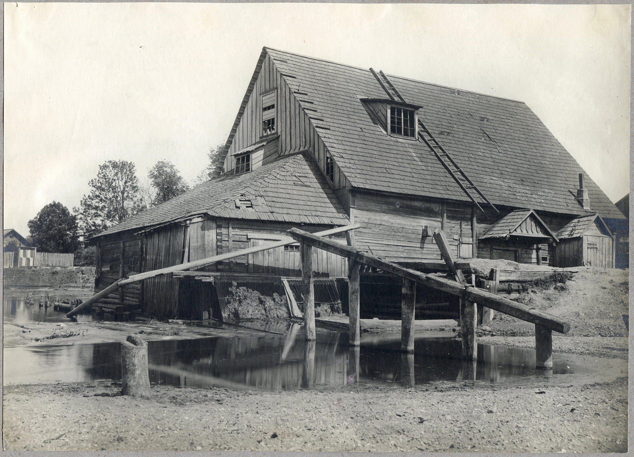 Беларуская (тарашкевіца): Менску (Miensk), Плябанскія Млыны (Plabanskija Młyny). Млын водны